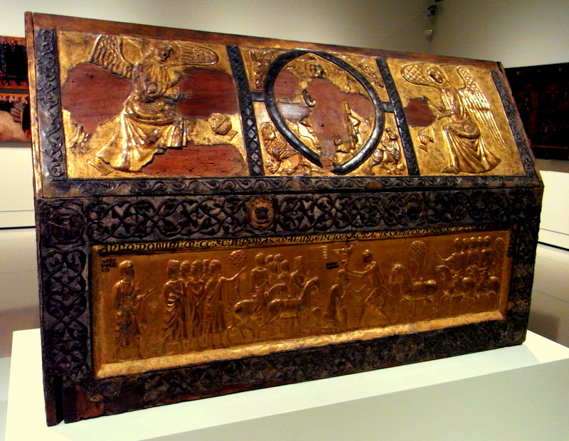 Autor.anónimo. Urna relicario de San Cándido procedente del monasterio de Sant Cugat del Valles (Barcelona) Datada 1292 Se conserva en el Museo Nacional de Arte de Cataluña